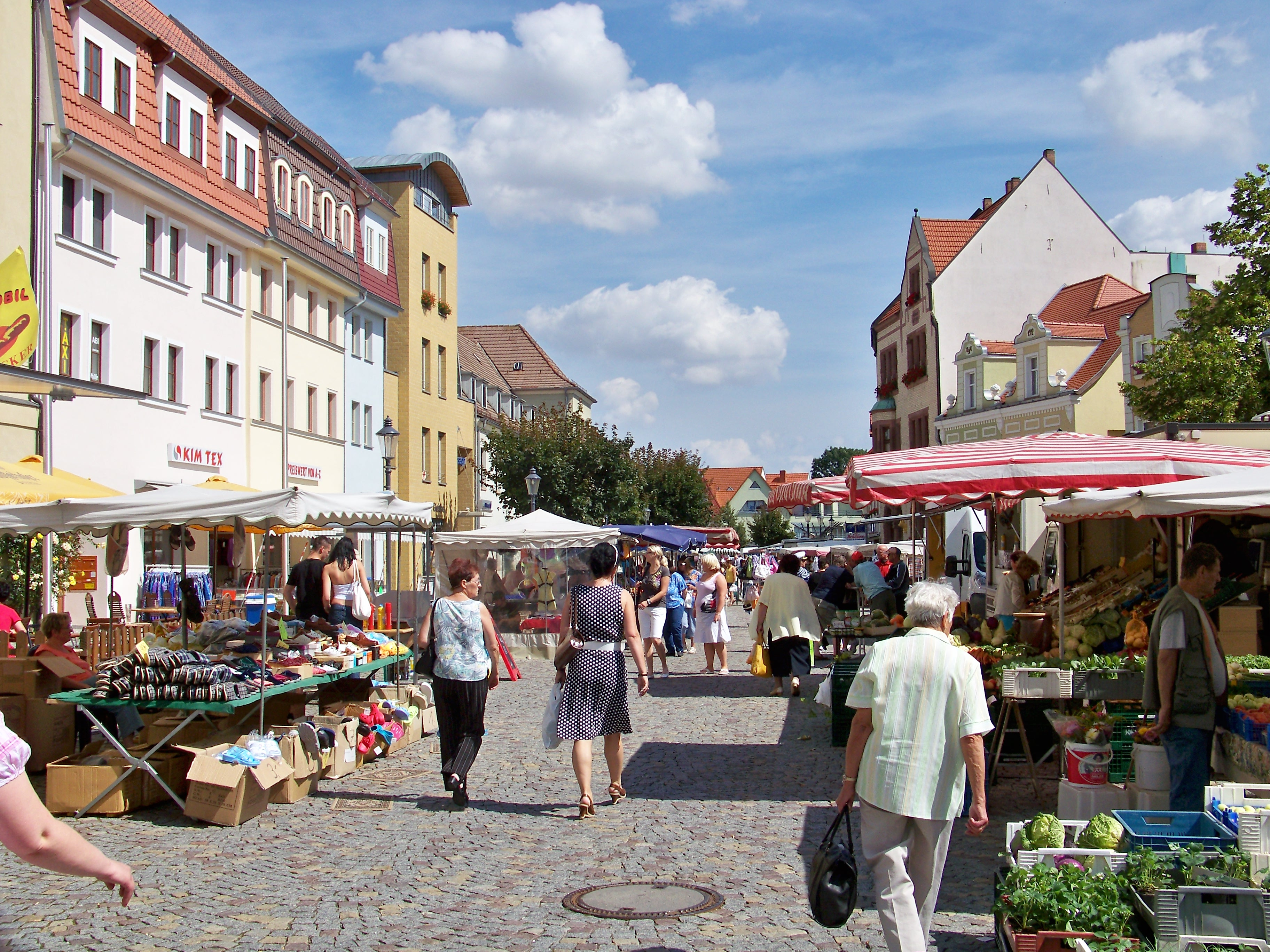 Wochenmarkt in Hettstedt